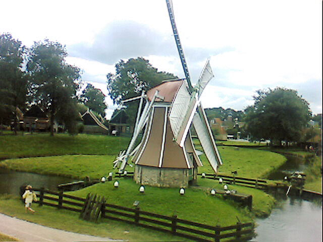 Vogelhoeksmolen, Enkhuizen, the Netherlands